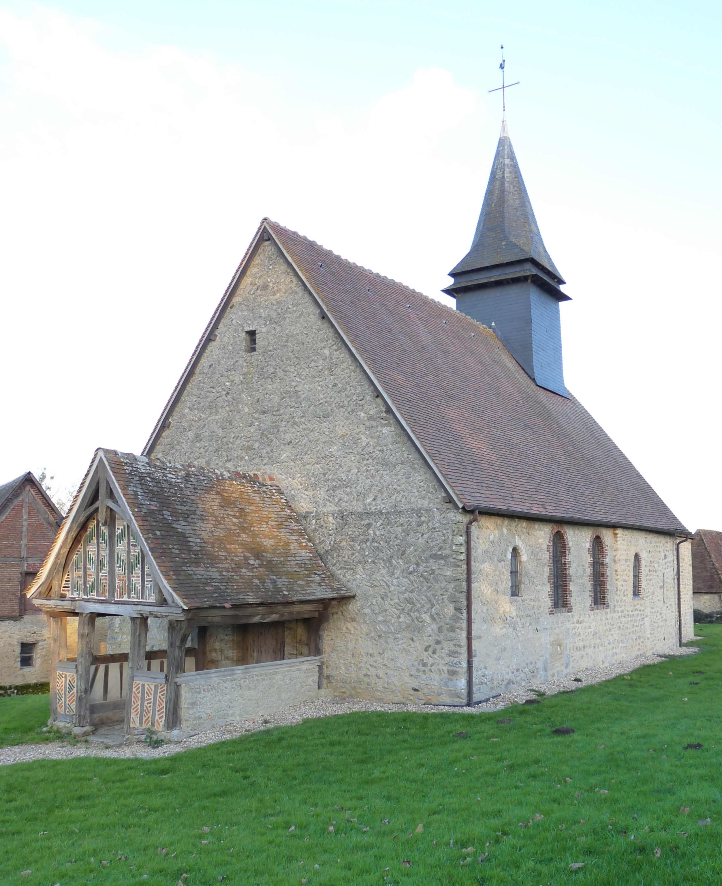 Église Saint-Pierre de Beuvreuil .